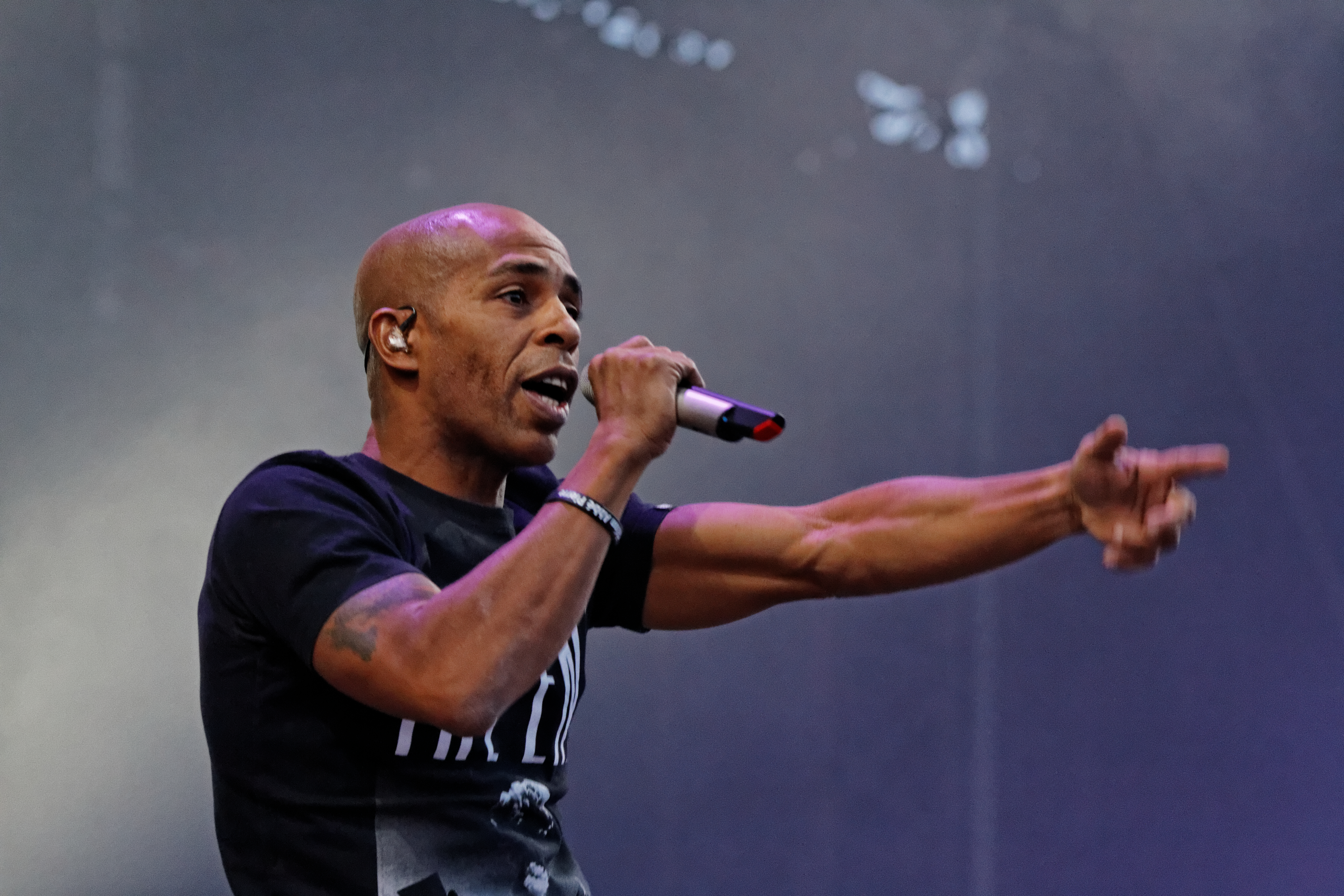 IAM en concert sur la grande scène lors de la fête de l'Humanité 2014.